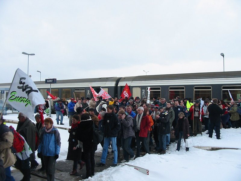 Arrivée de manifestants par le train en gare de Guéret